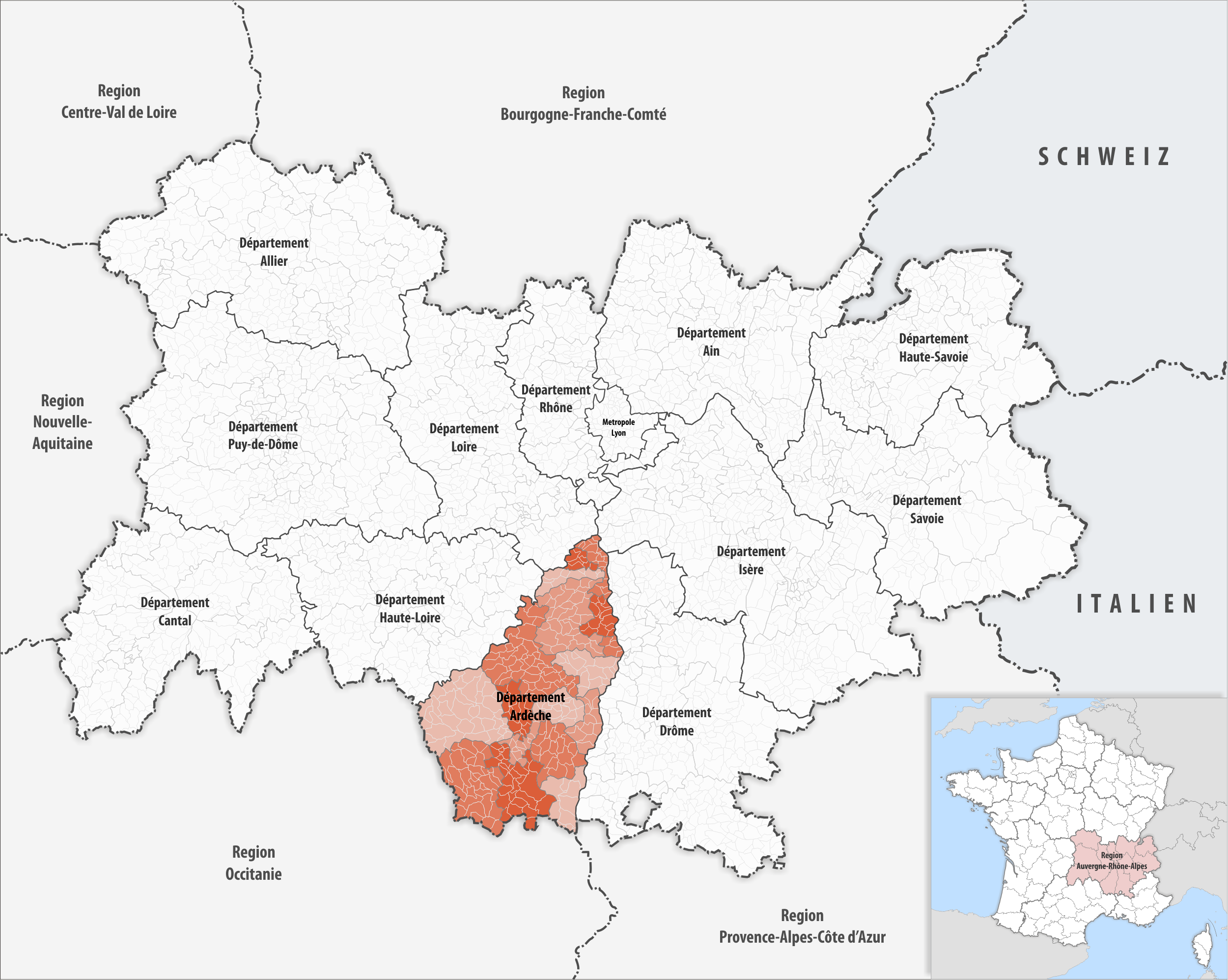 Lage des Departements Ardèche